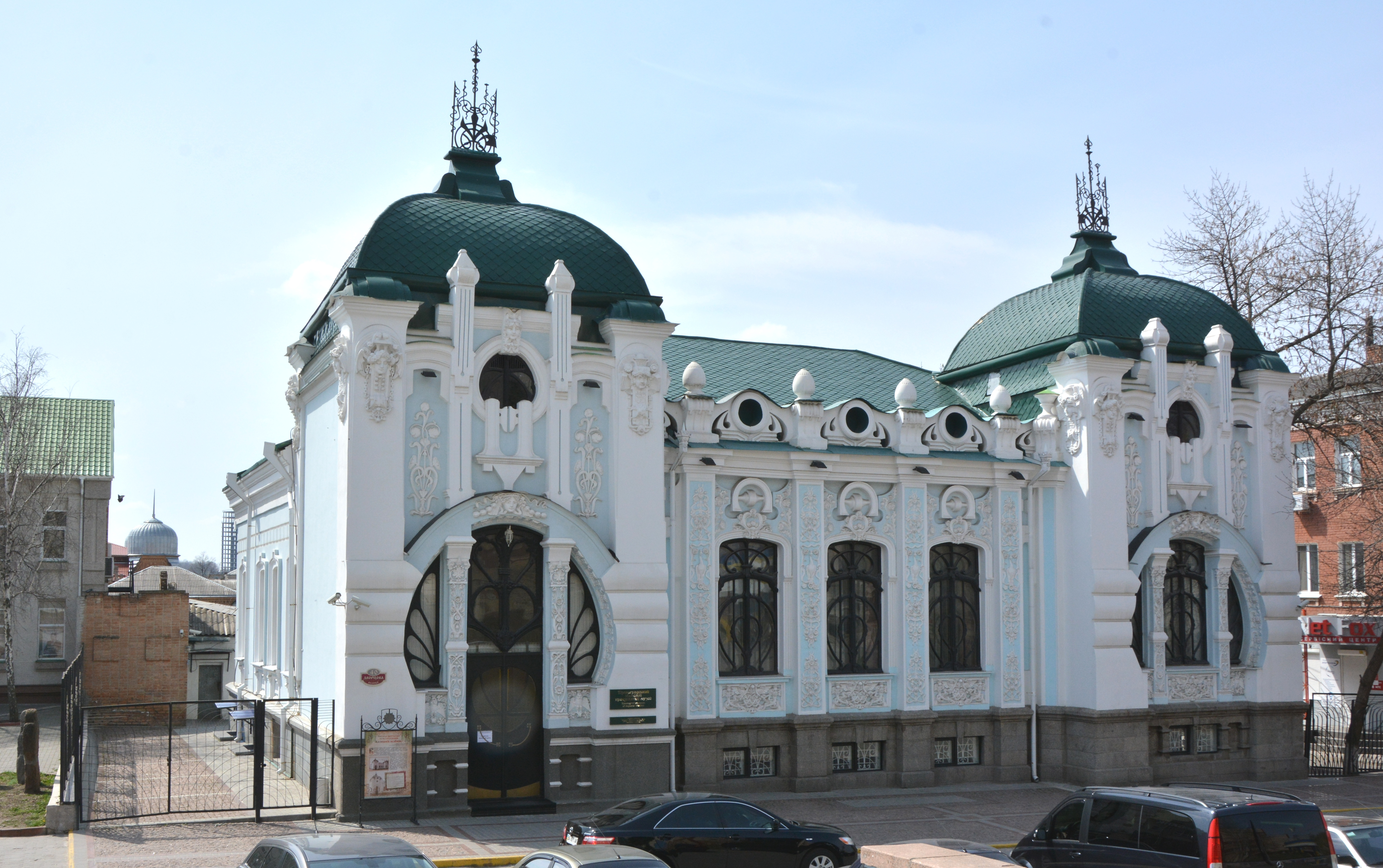 Особняк, Кіровоград, вул. Дворцова, 40